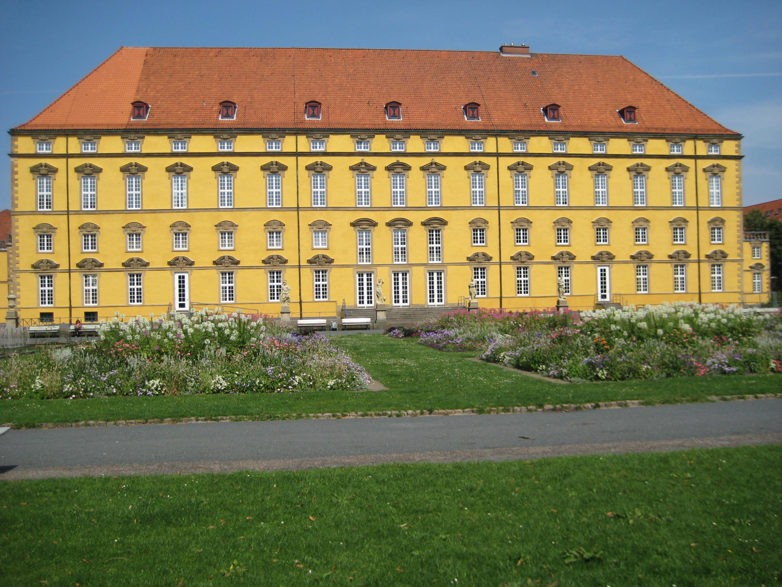 Schloss Osnabrück 2008, vom Schlossgarten aus gesehen